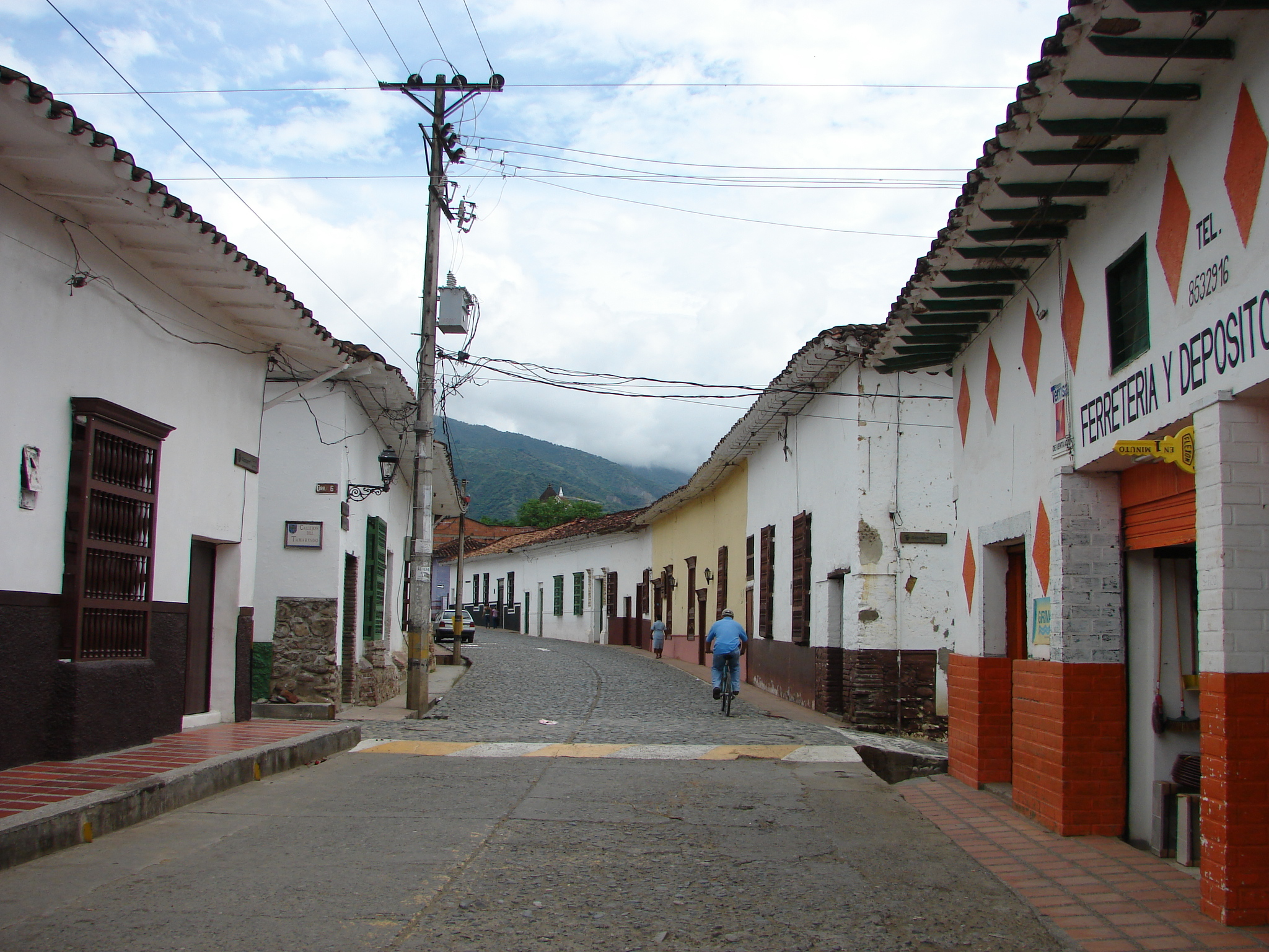 Calle hacia el parque principal del municipio de Santa Fe de Antioquia. Departamento de Antioquia, Colombia.